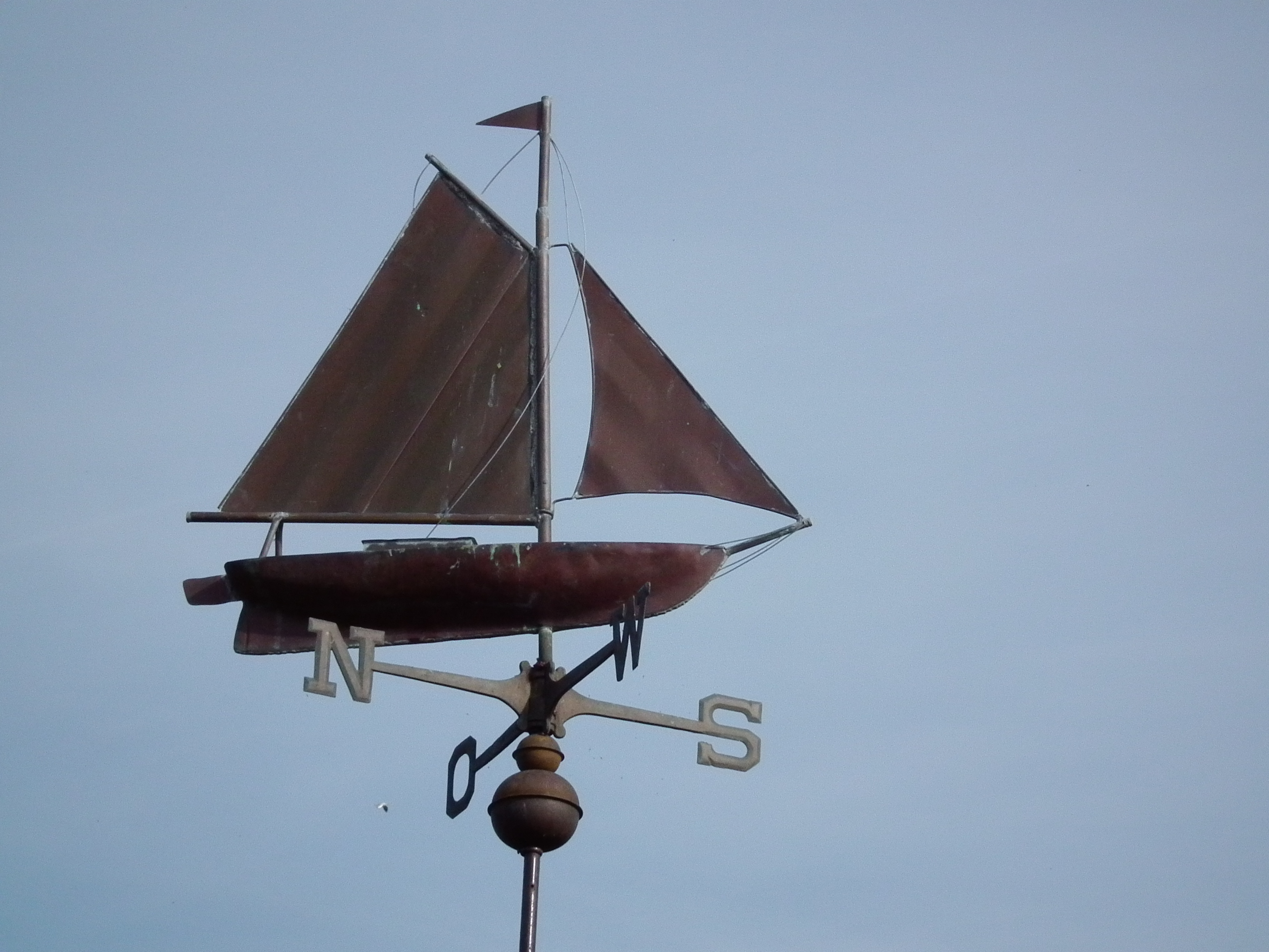 Wetterfahne in Form eines Segelschiffs, fotografiert in Norddeich (Niedersachsen, Deutschland)